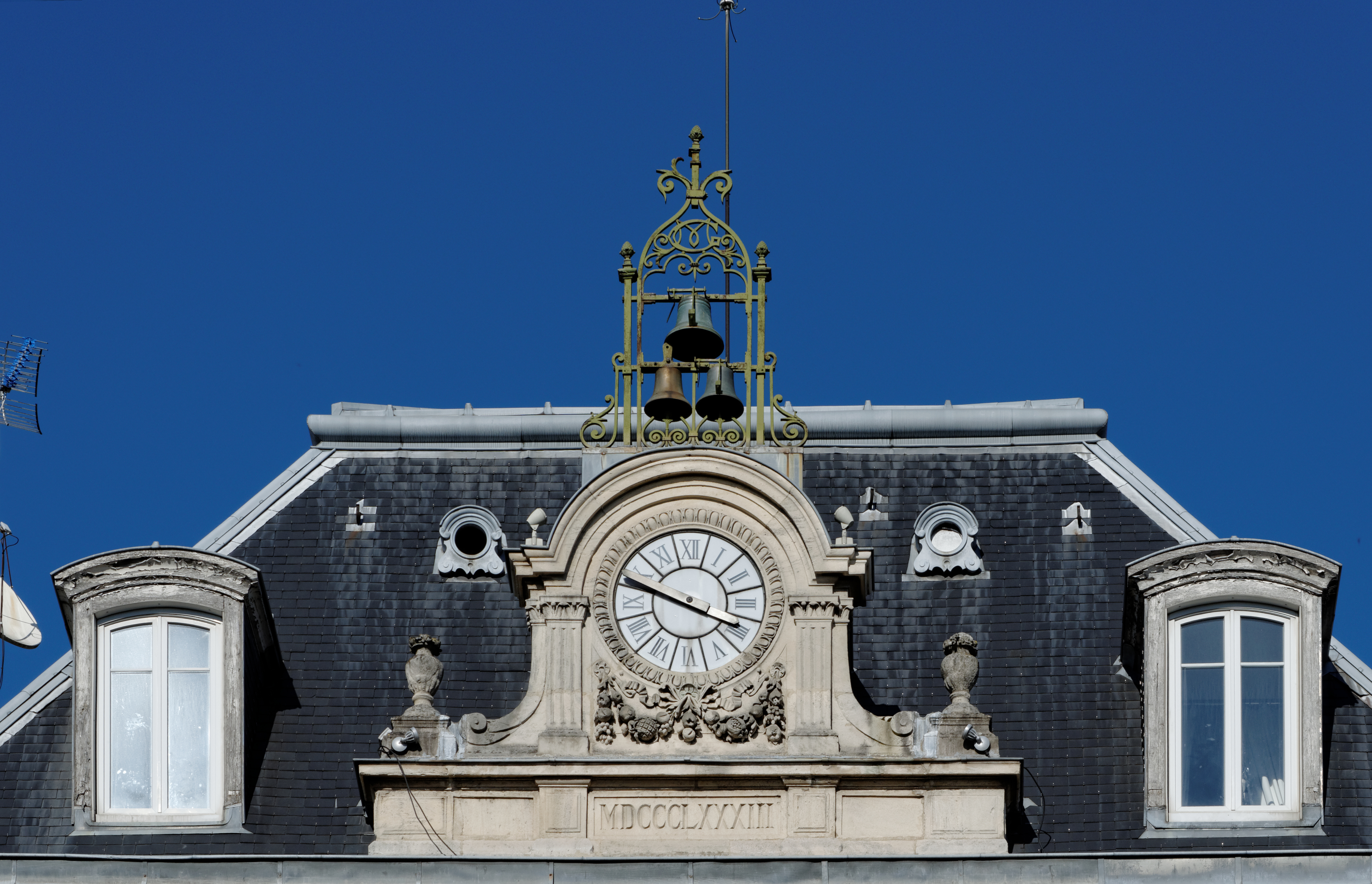 Détail du toit du Grand hôtel la cloche, place Darcy à Dijon (France)